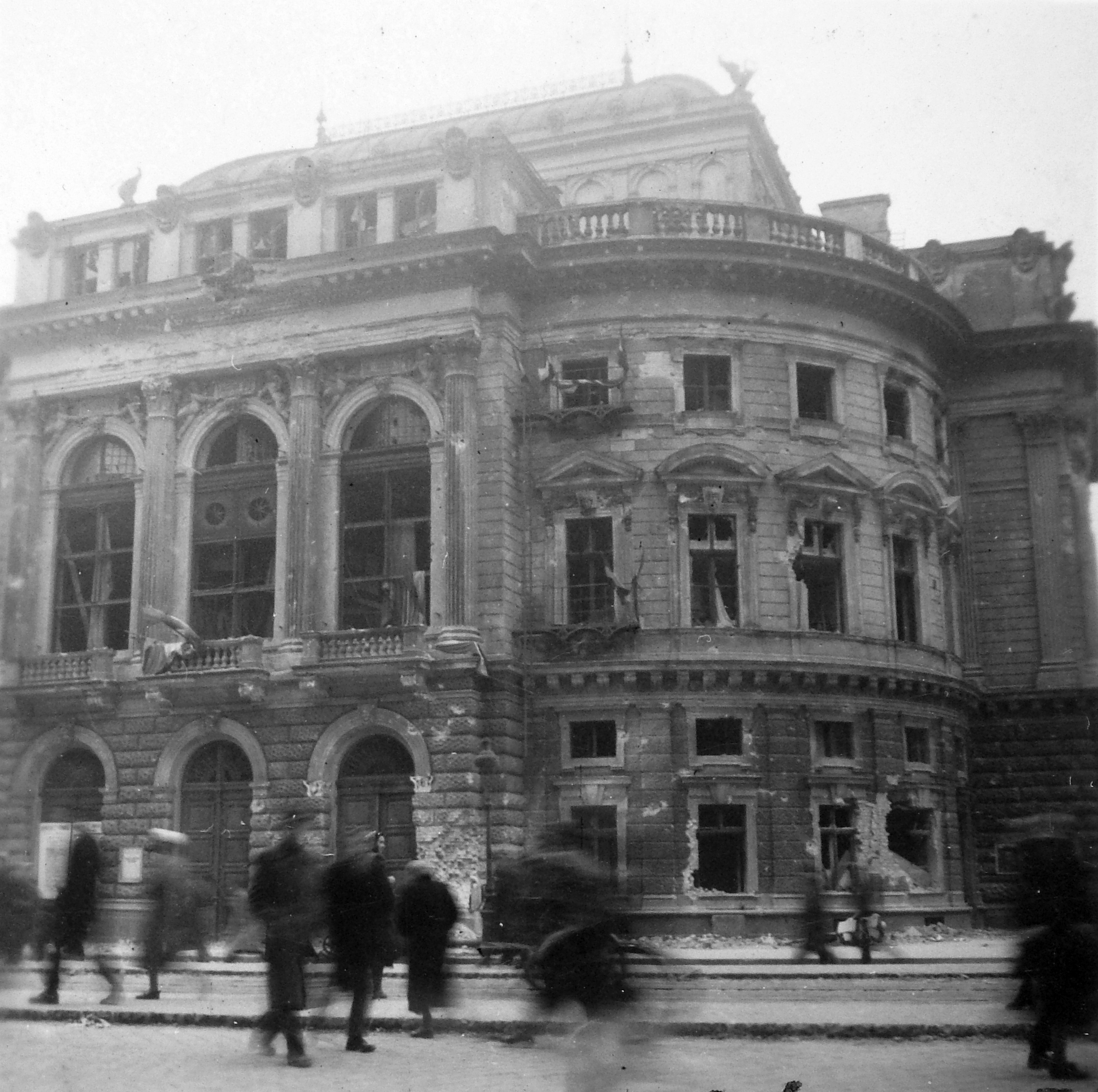 Blaha Lujza tér, Nemzeti Színház. Location: Hungary, Budapest VIII. Tags: revolution, damaged building, theater, pedestrian, Budapest Title: Blaha Lujza tér, Nemzeti Színház.